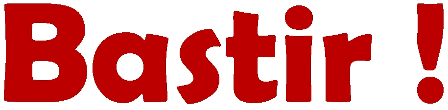 Logo Bastir